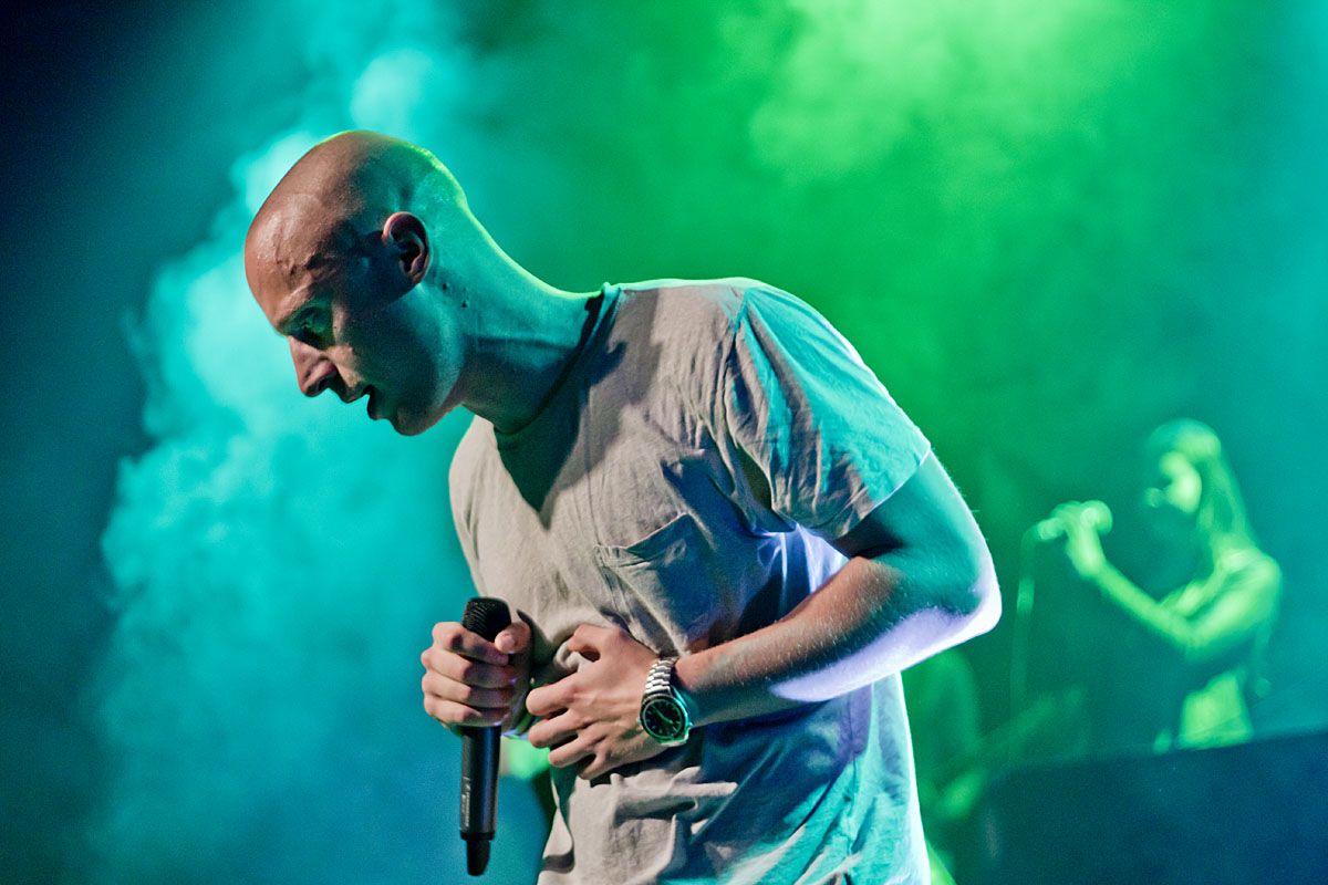 Rapperen Pede B ved en koncert på spillestedet Forbrændingen den 18. oktober 2012